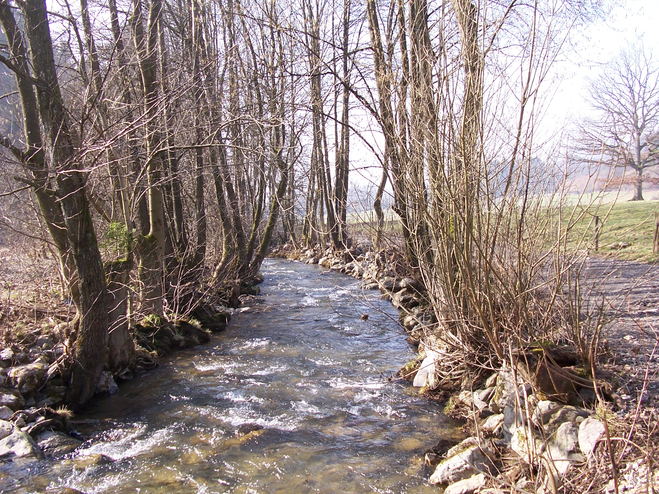 De Roannay in de buurt van Moulin du Ruy (La Gleize, Stoumont) op zaterdag 5 maart 2011.